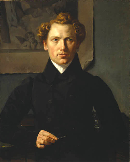 Diese - hier nur bescheiden kleine - digitale Wiedergabe eines Ölgemäldes aus dem Besitz der Museumslandschaft Hessen Kassel zeigt das Ölgemälde des Malers und späteren Fotografen Ferdinand Tellgmann unter dem Titel Porträt eines Kupferstechers. Das Werk ist rückseitig signiert und datiert 1834. Zum Werk vermerkt die Besitzerin: „Halbfigur en face eines Kupferstechers vor seinem Arbeitstisch. Er hat lockiges, blondes Haar und trägt einen schwarzen Rock mit hohem Kragen und weißer Halsbinde. In seiner Rechten hält er ein Stecheisen, rechts auf dem Tisch liegen eine Kupferplatte und weitere Geräte. An der grauen Rückwand ist ein Stich nach Raffaels "Sixtinischer Madonna" angebracht.“ ...